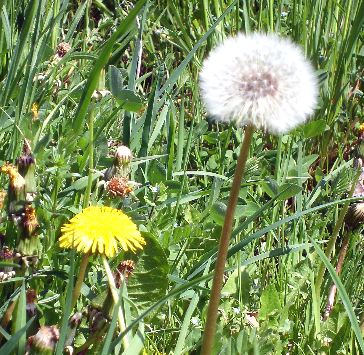 Löwenzahn - Pusteblume im Mai